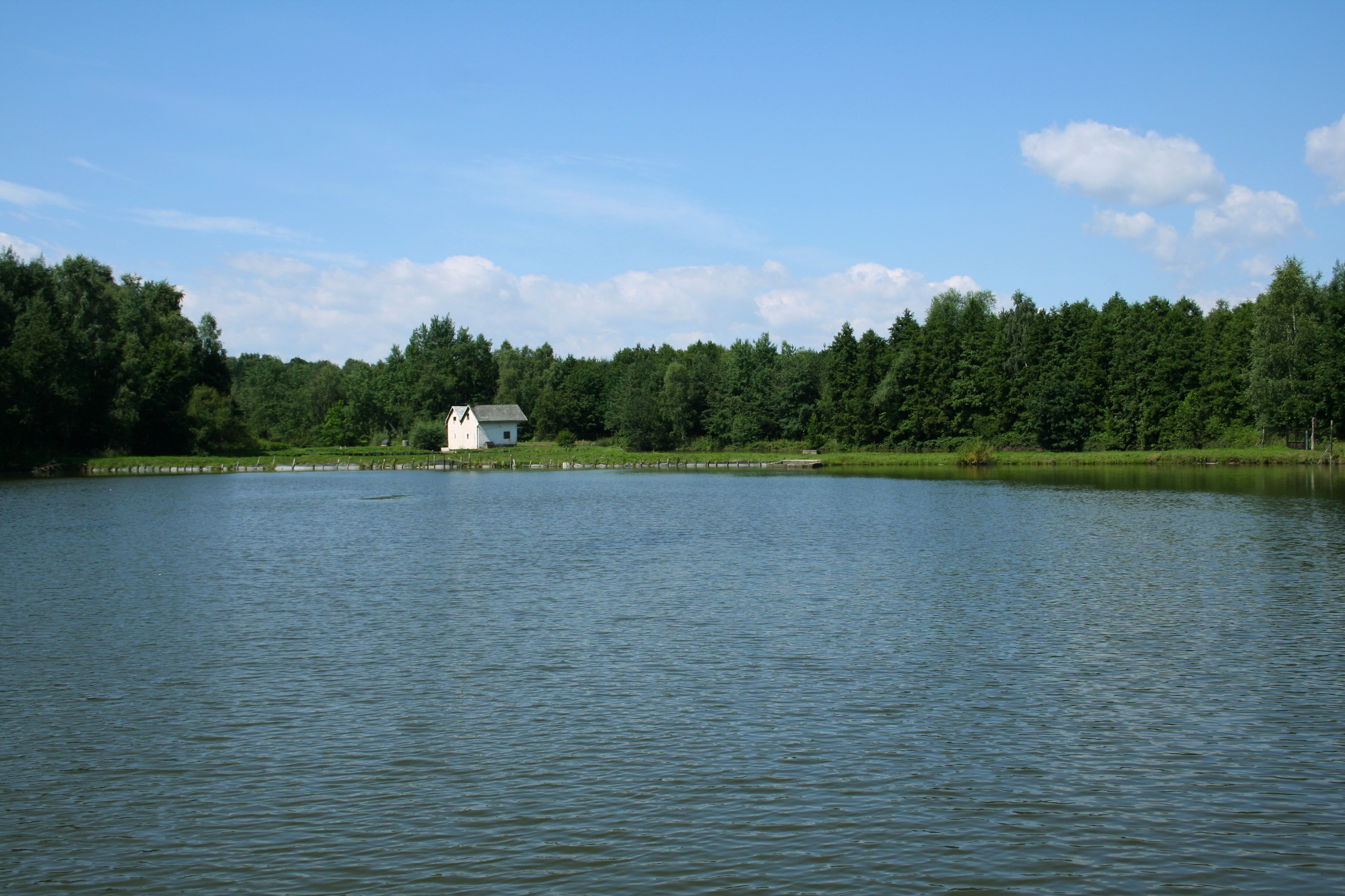 Rybnik - Księżok, staw